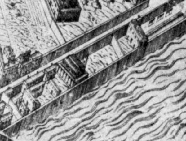 Monastero delle ingesuate nella pianta del buonsignori